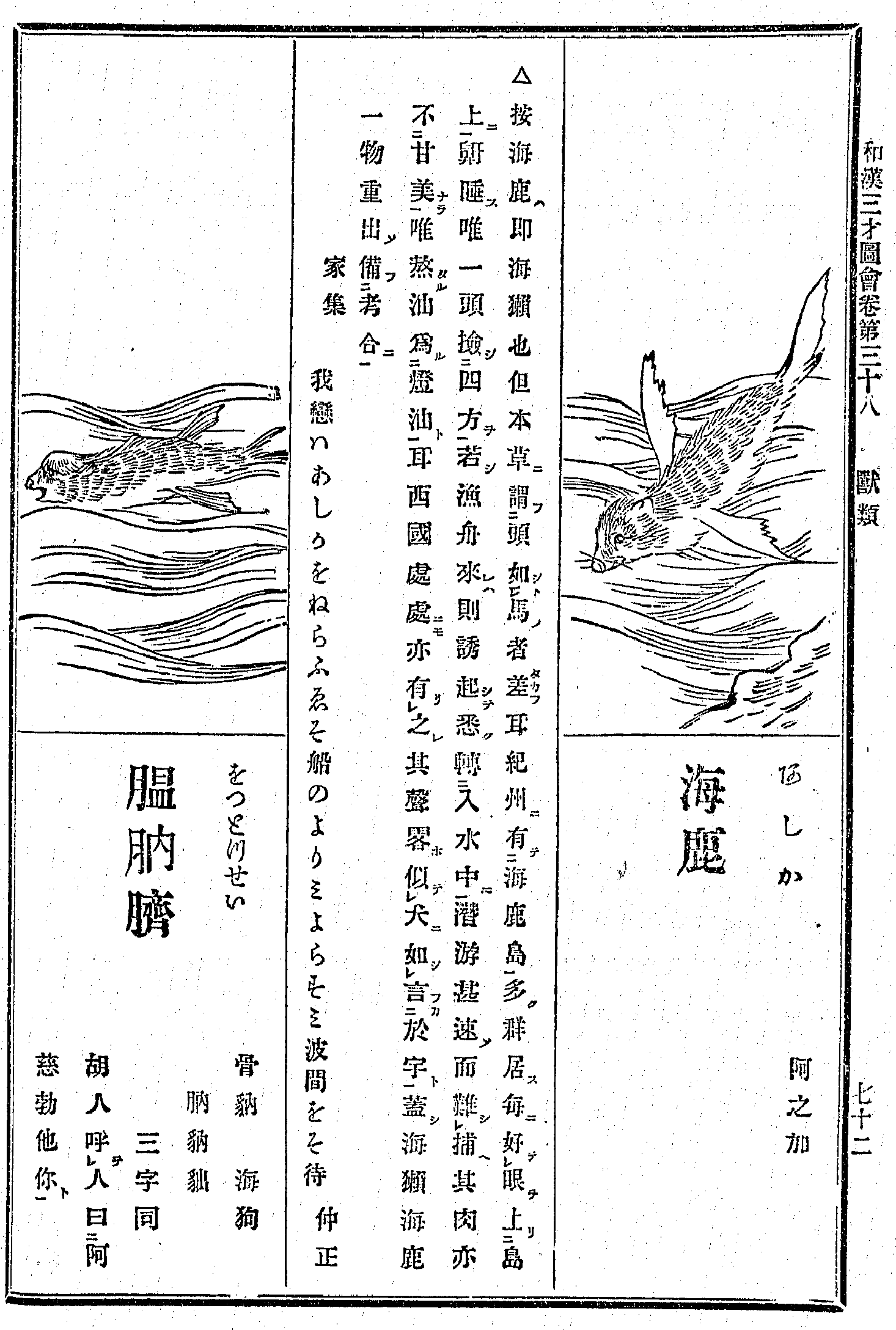 和漢三才図会, 38巻獣類72, アシカとオットセイ, Wakan Sansai Zue, vol 38 p. 72, Sea Lion and Fur seal